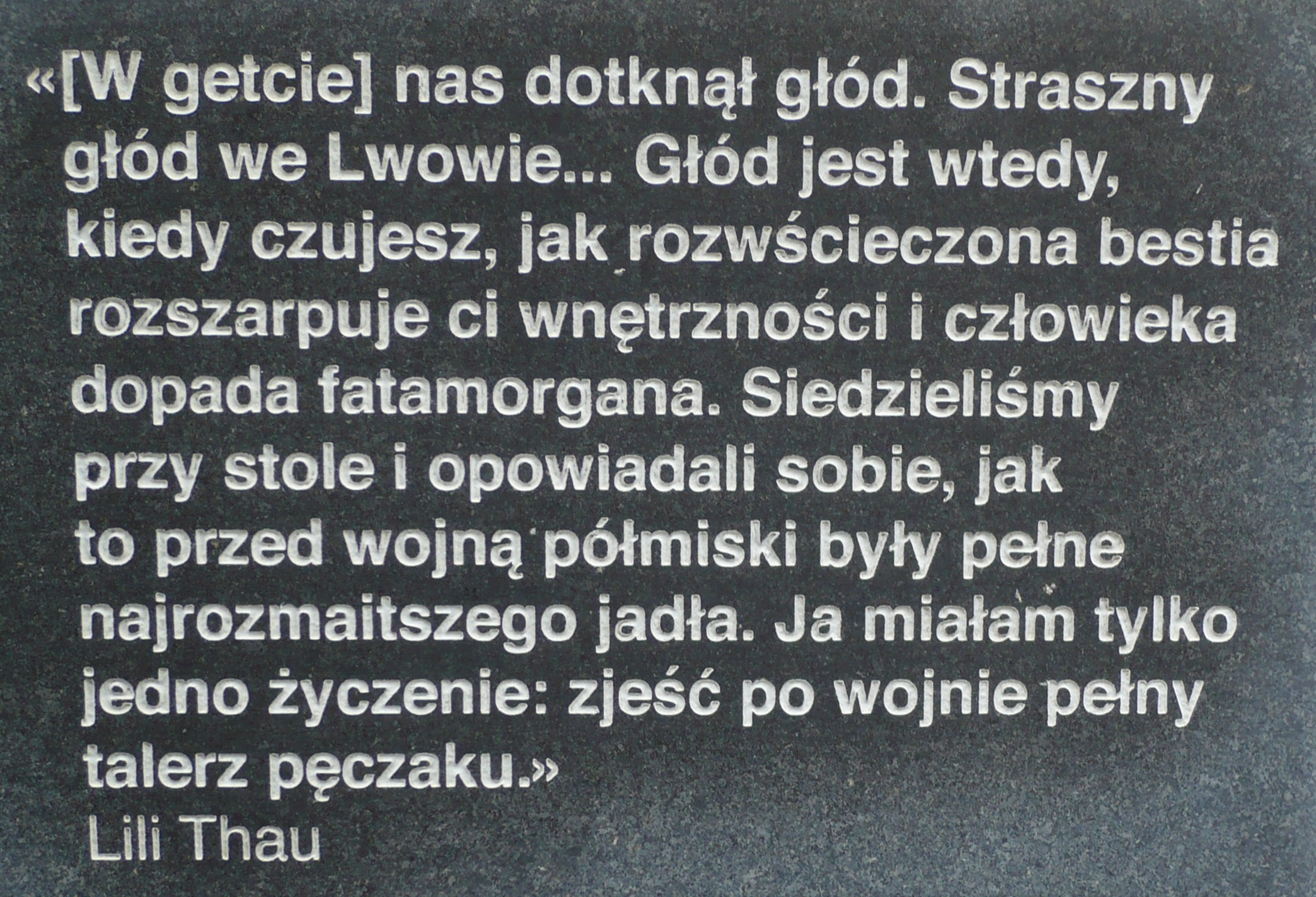 Synagoga Złota Róża we Lwowie. Pomnik